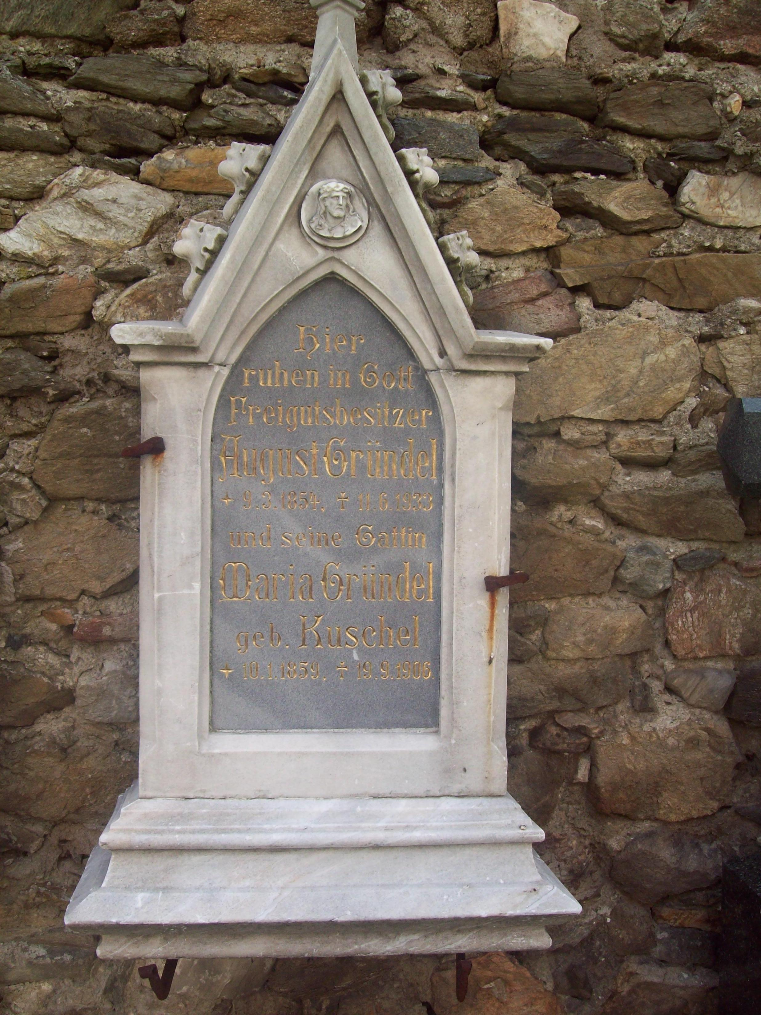 Nagrobek Gruendelow na starym cmentarzu